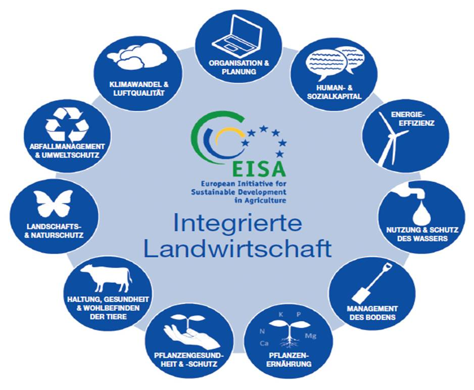 Diagramm mit den wesentliuchen 11 Elementen der Integrierten Landwirtschaft